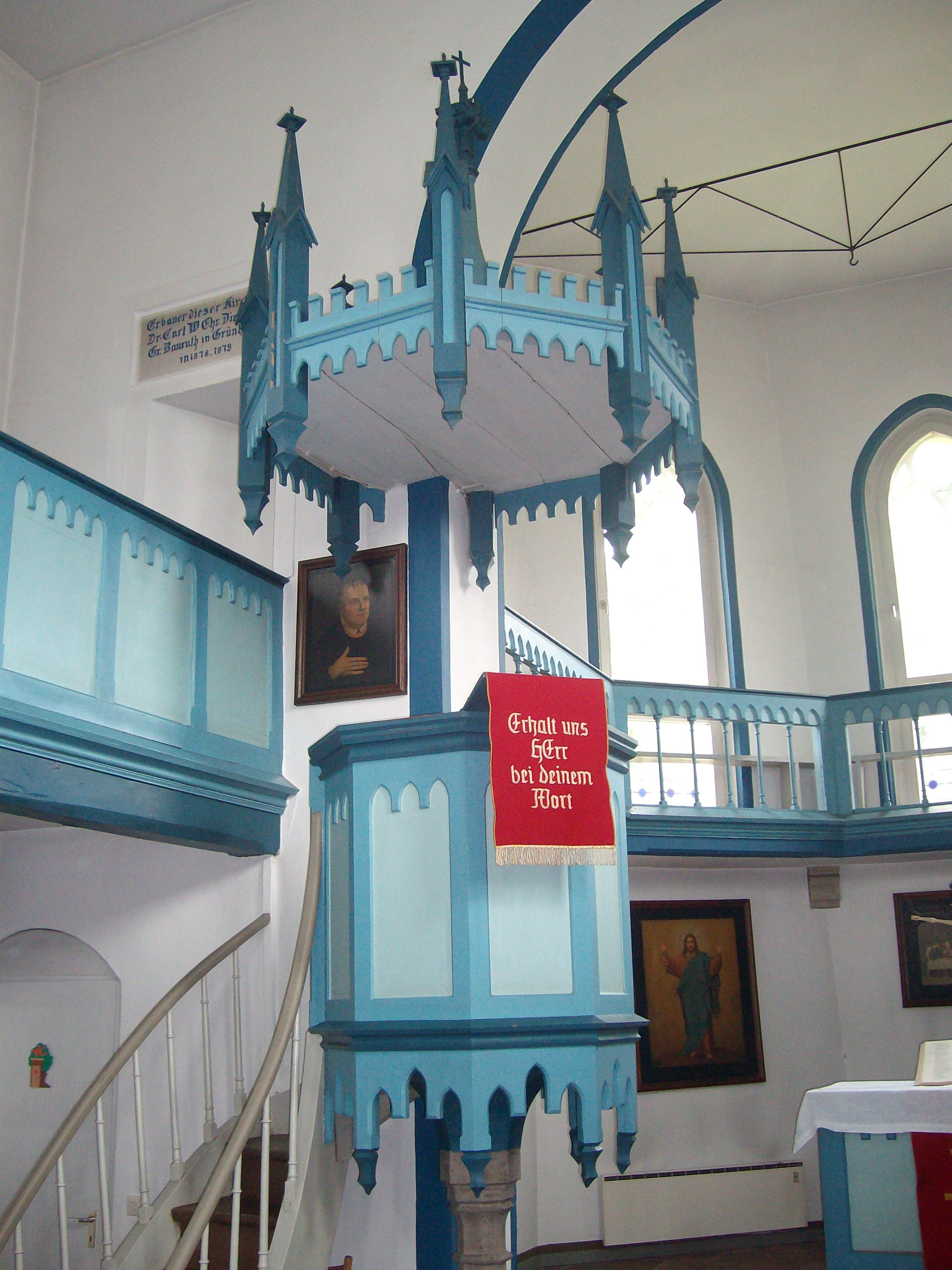 Evangelische Kirche Röthges, Laubach, Landkreis Gießen, Hessen, Deutschland